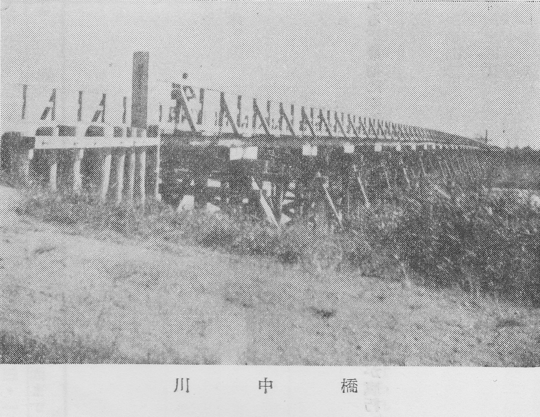 現在の名古屋市北区にあたる場所にかつて架橋されていた川中橋の写真。詳細不明。現存せず。